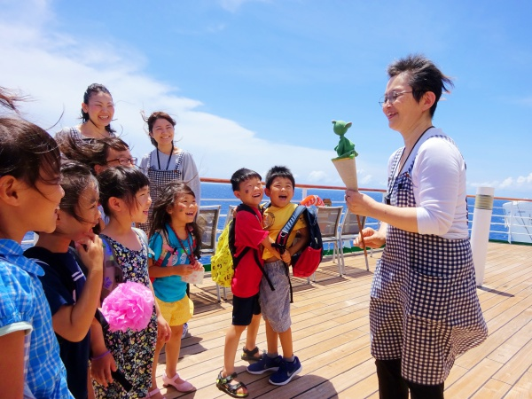 2018年5月、インド洋上にて撮影。青々とした空と海に囲まれ、子どもたち、保護者の皆さん、保育士と記念撮影タイム、子どもたちのキラキラとした笑顔が輝く。